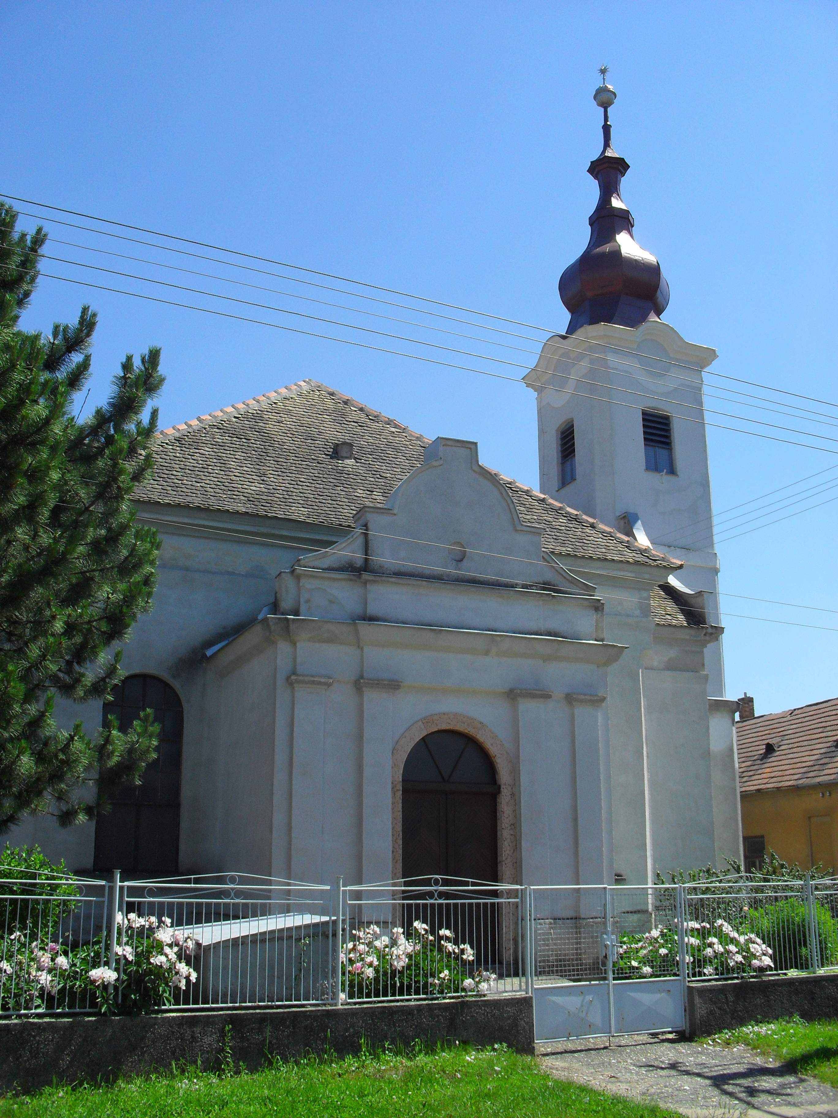 Komáromszentpéter - református templom